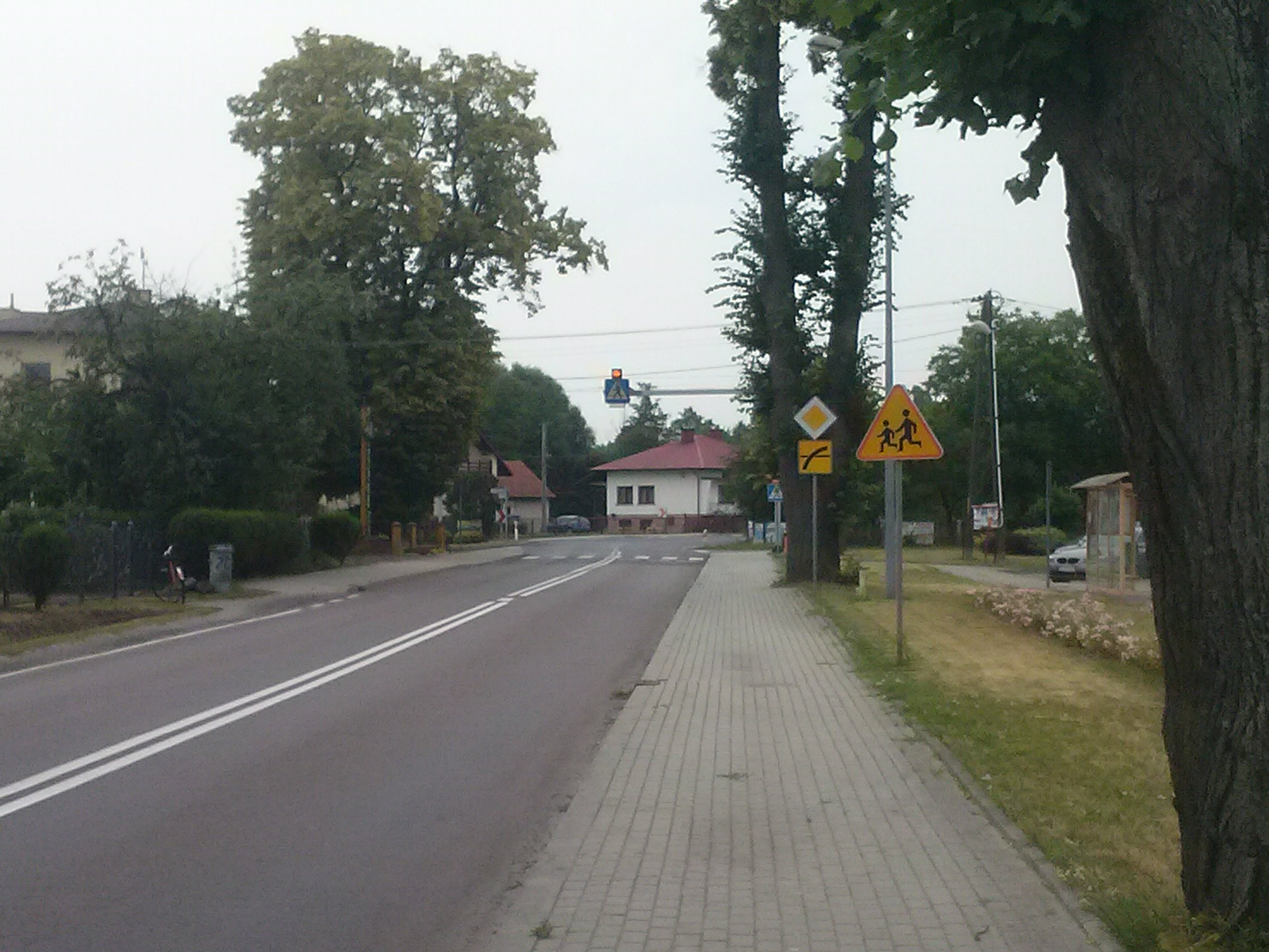 Ostry zakręt Drogi Krajowej nr 77 w Gorzycach, z ograniczoną widocznością